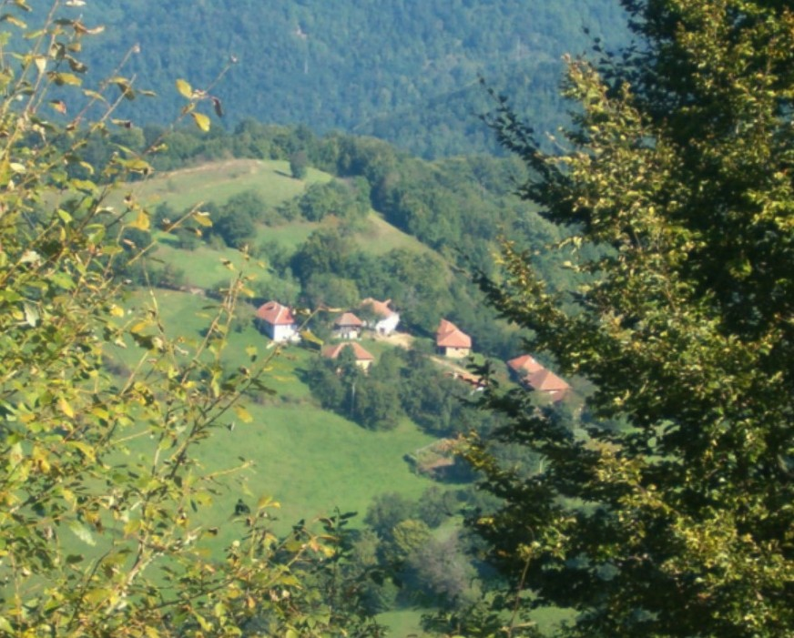 Горње Романовце